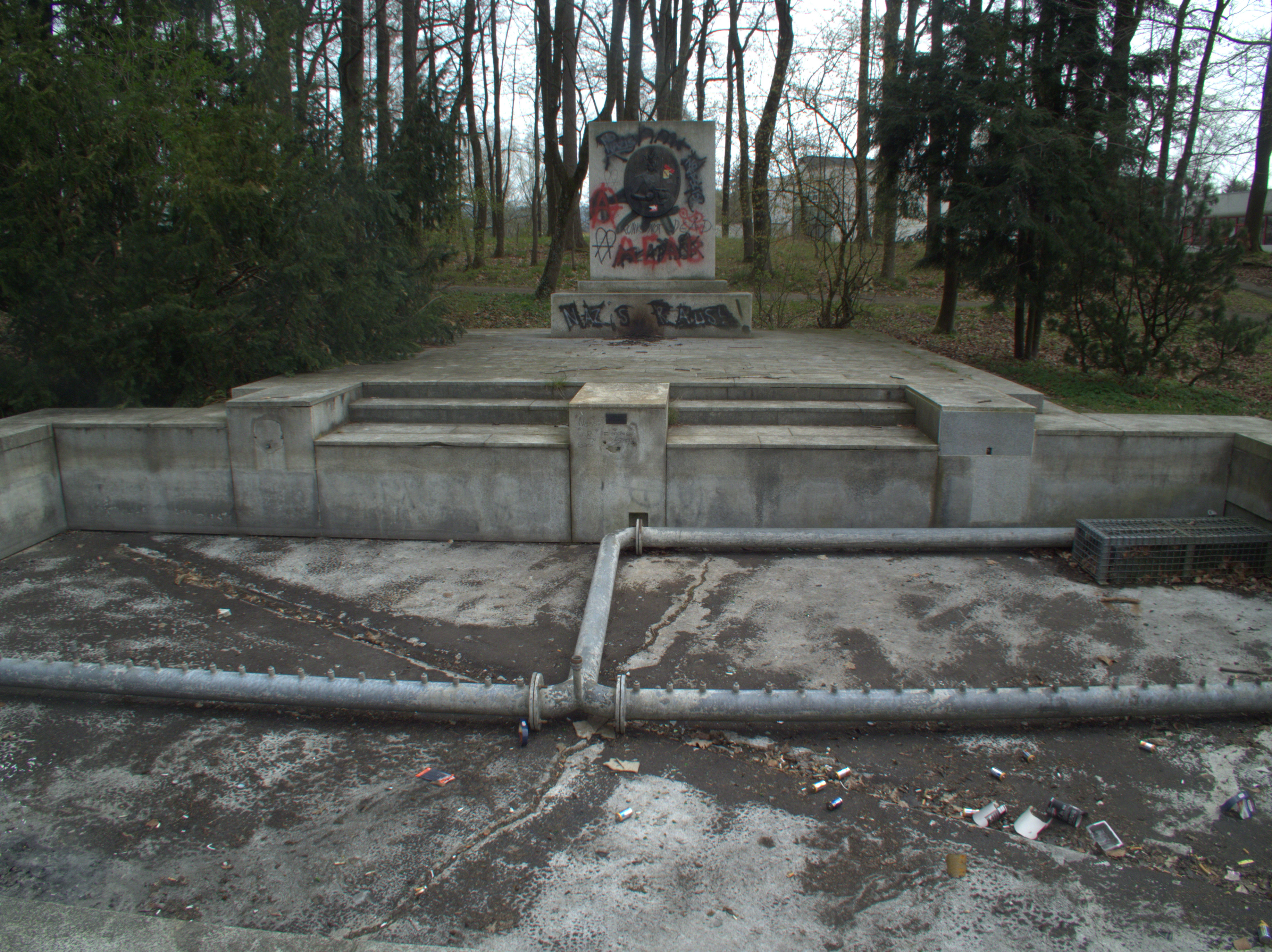 Stadtpark Neumarkt König Christoph Denkmal, gegenwärtig ein Lieblingsplatz extremer Linker, Rechter und sonstiger Alkoholgelageveranstalter.